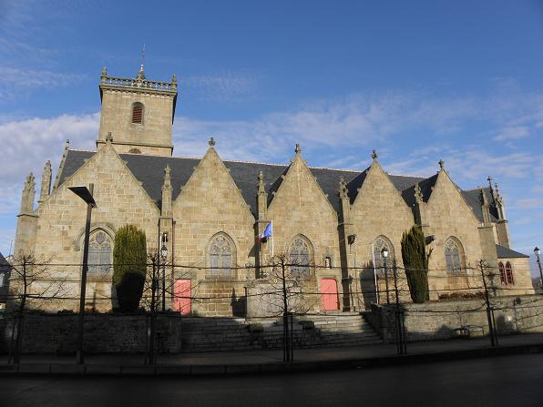 Église Saint-Martin de Louvigné-du-Désert (35).